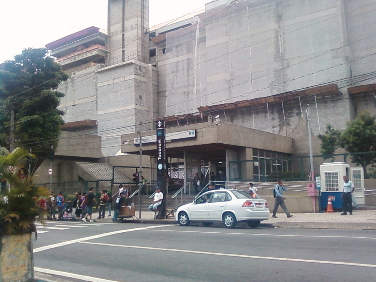 Fachada da Estação Tucuruvi, do Metrô de São Paulo.